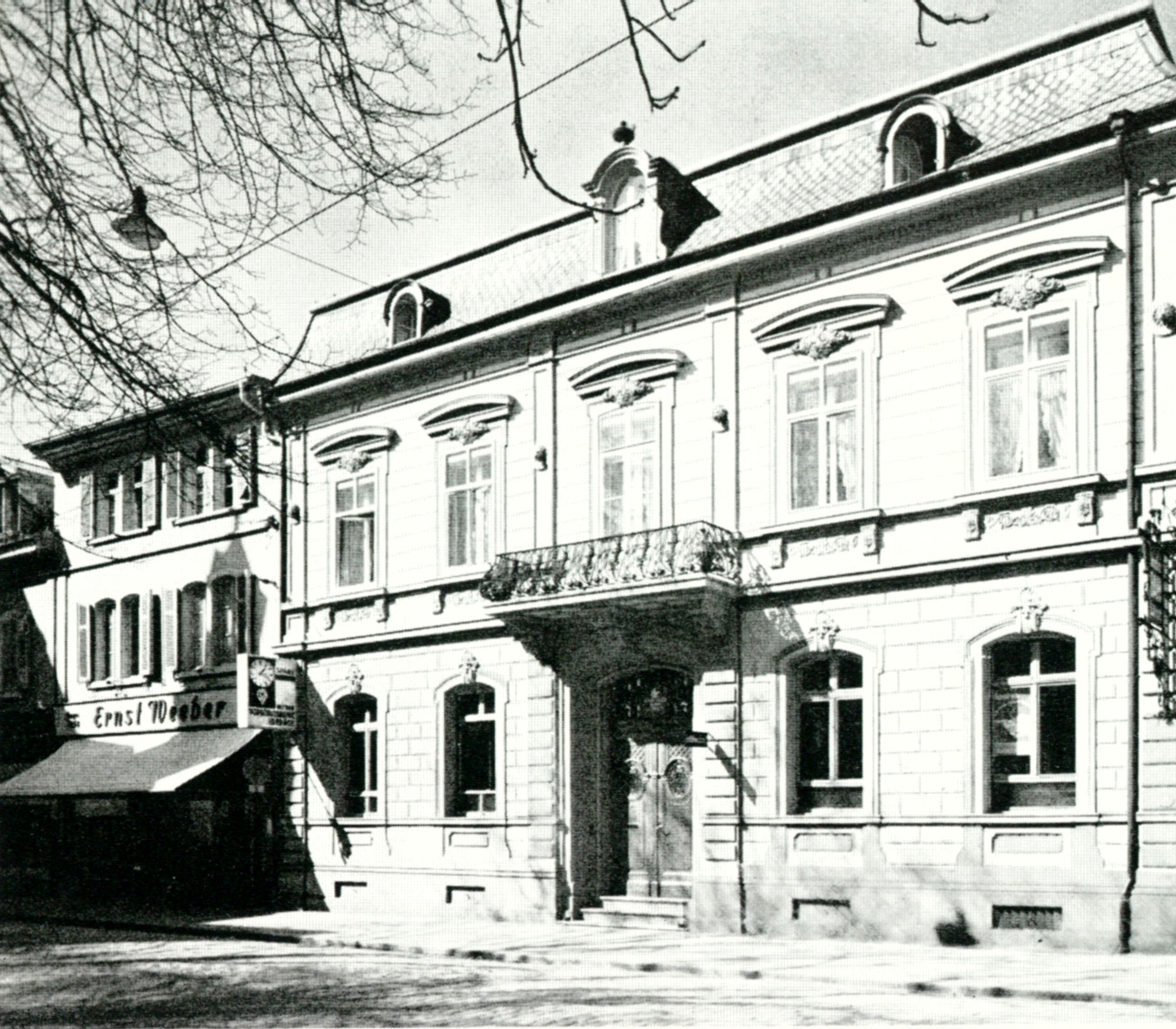 Filiale Lörrach-Mitte alt. Alte Hauptstelle